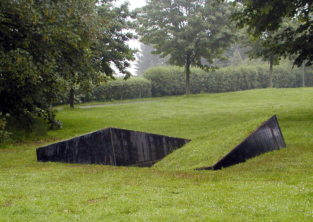 Benoît Tremsal, Zwei gekippte Flächen, 2007, – Niedersachsen, Osnabrück, Westerberg-Park